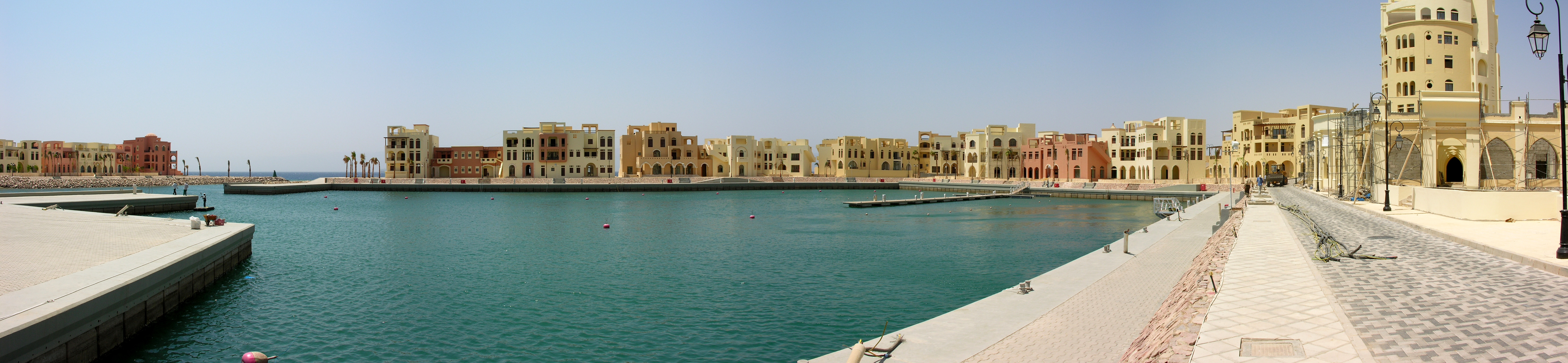 Tala Bay near Aqaba